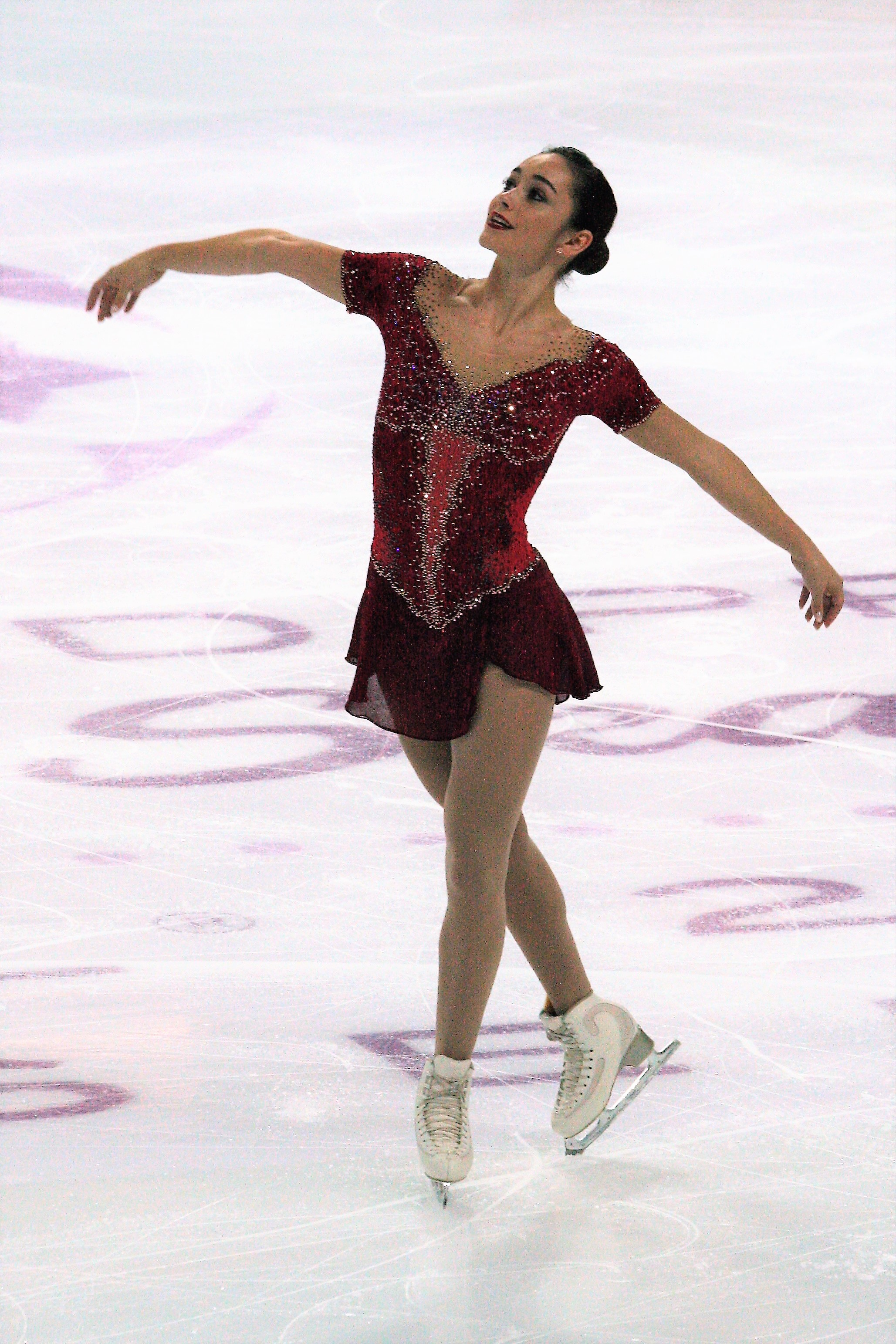 Кэйтлин Осмонд (Канада) на финале Гран-при по фигурному катанию 2016-2017